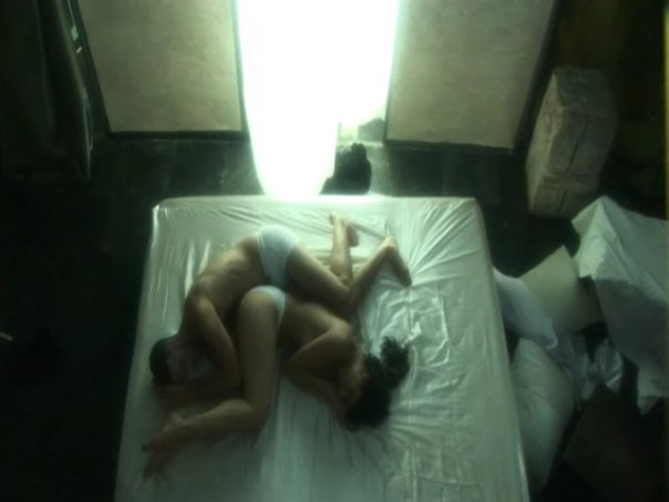 הוידאודאנס שיר "שיר אהבה" של עמנואלה עמיחי